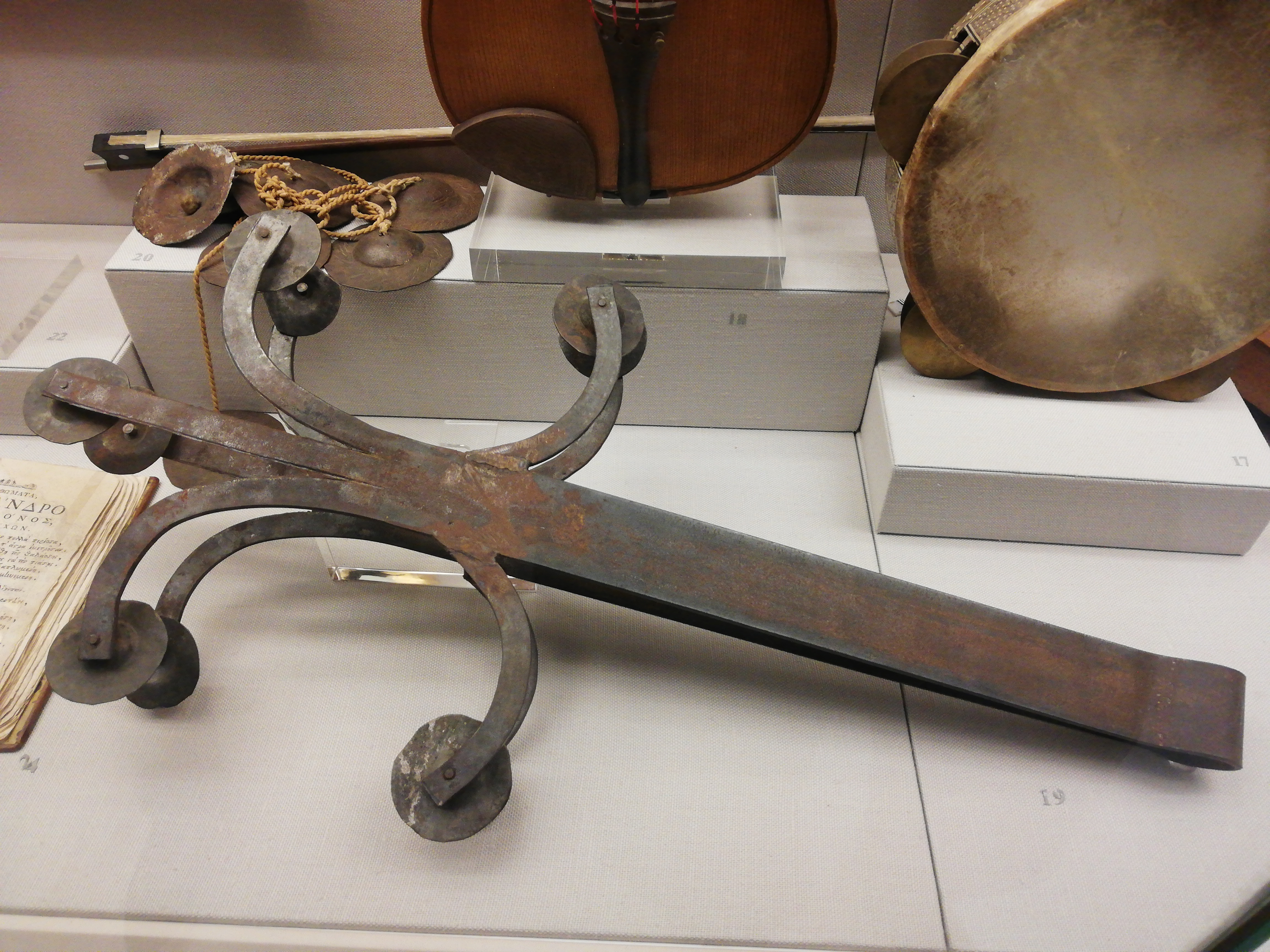 Au premier plan: une Masia en fer, instrument à percussion d'origine grecque. Il est à présent seulement utilisé par les enfants dans la région de Thrace.